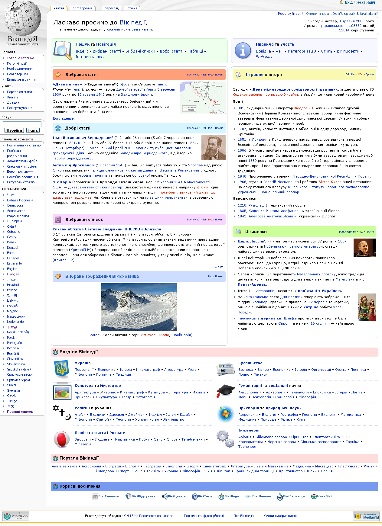 Ukrainian Wikipedia Main Page